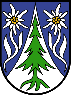 Au (Vorarlberg), Vorarlberg: Ein blauer, von einer eingebogenen silbernen Spitze durchzogener Schild. Die Spitze ist mit einer abgeledigten natürlichen entwurzelten Tanne belegt und von je einem silbernen, golden besamten Edelweiß an beblättertem Stängel begleitet. Den Schild umgibt eine ornamentierte bronzefarbene Randeinfassung. (Verleihung: 6. August 1930)